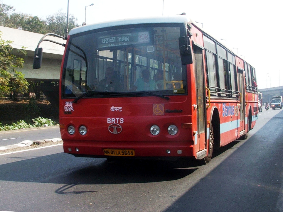 504 CBD Belapur - Wadala bus at CBD Belapur Flyover